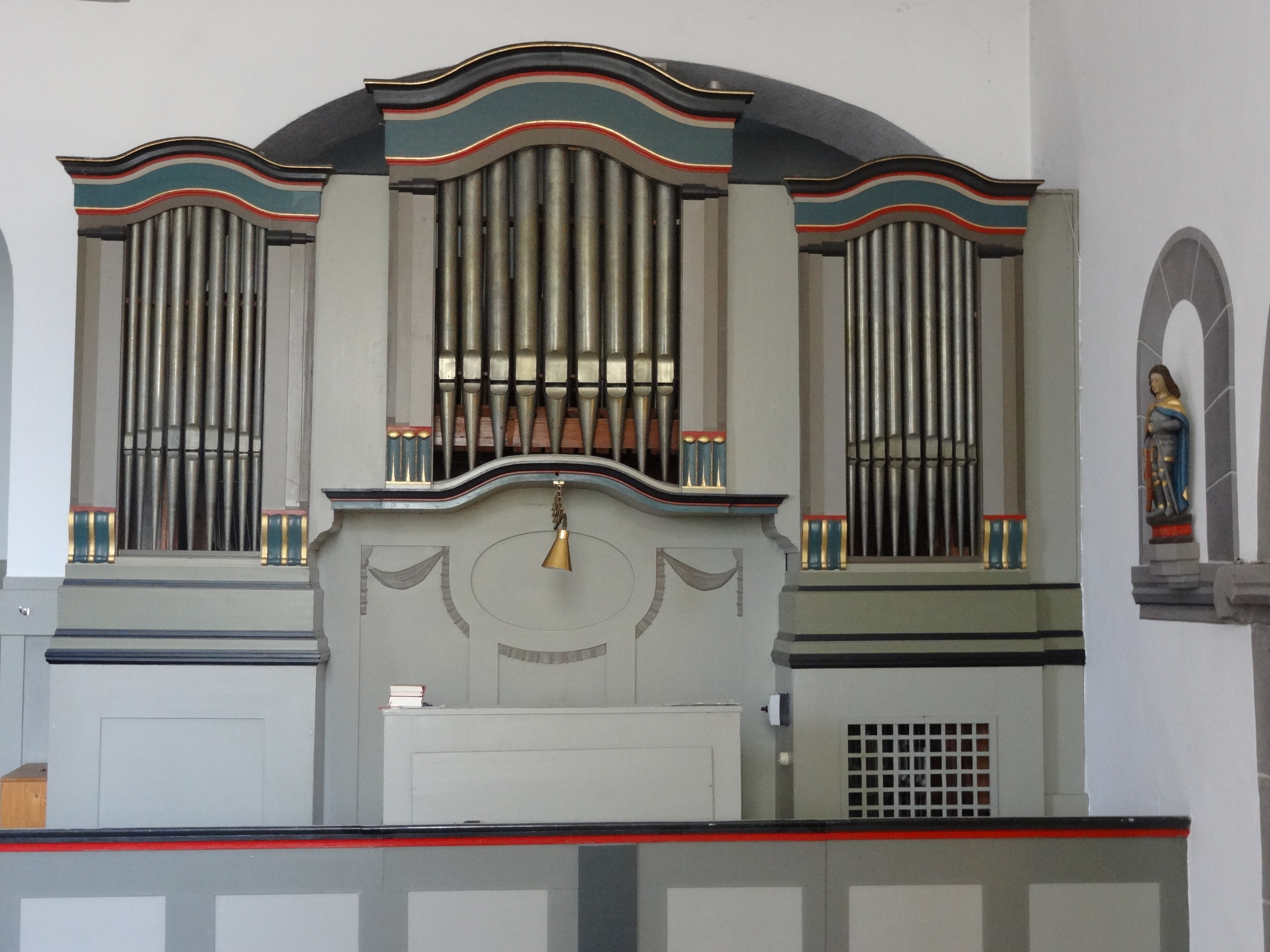 St. Peter (Großen-Linden)